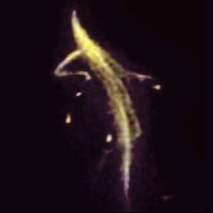 Feu follet.